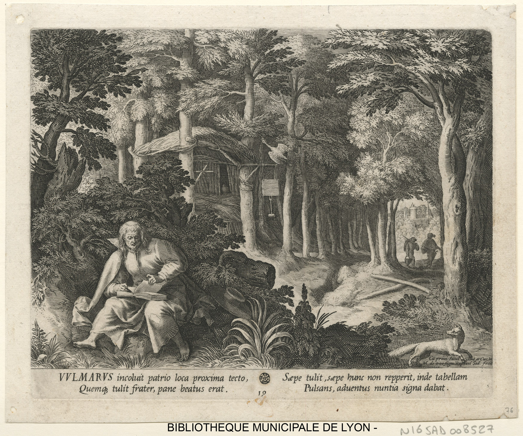 Vulmarus -1600 - Bibliotheque municipale de Lyon -Sadeler, Raphaël, 1560?-1632? (graveur) ; Vos Martin de, 1532-1603